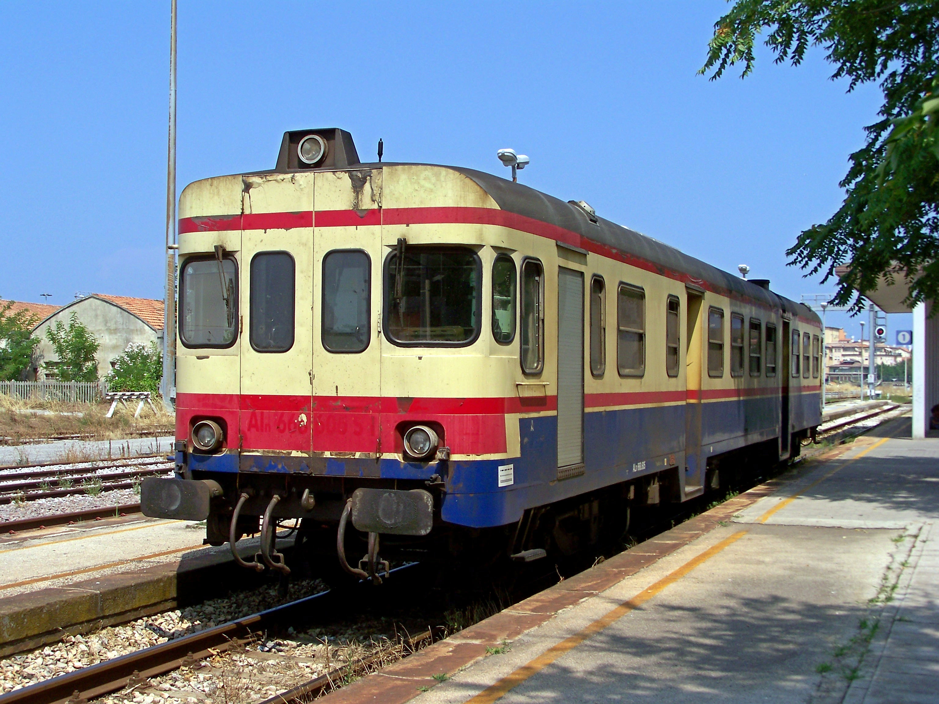 L'ALn 668.605 di Sistemi Territoriali in livrea avorio-blu della Società Veneta, in sosta presso il primo binario della stazione di Chioggia in attesa di espletare il Regionale 6446 per Rovigo.